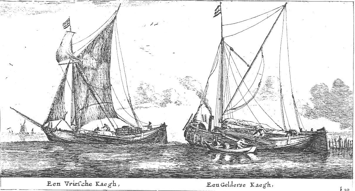 Zwei Kaagen unterschiedlicher Regionen, einmal aus Gelderland und einmal aus Friesland nach Reinier Zeeman